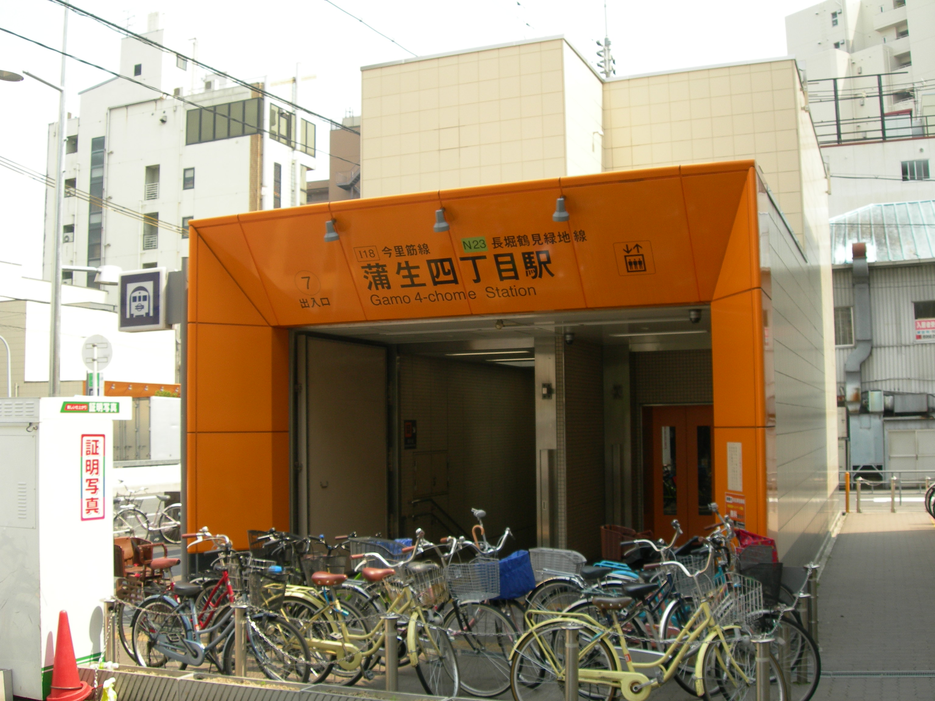 大阪市営地下鉄蒲生四丁目駅